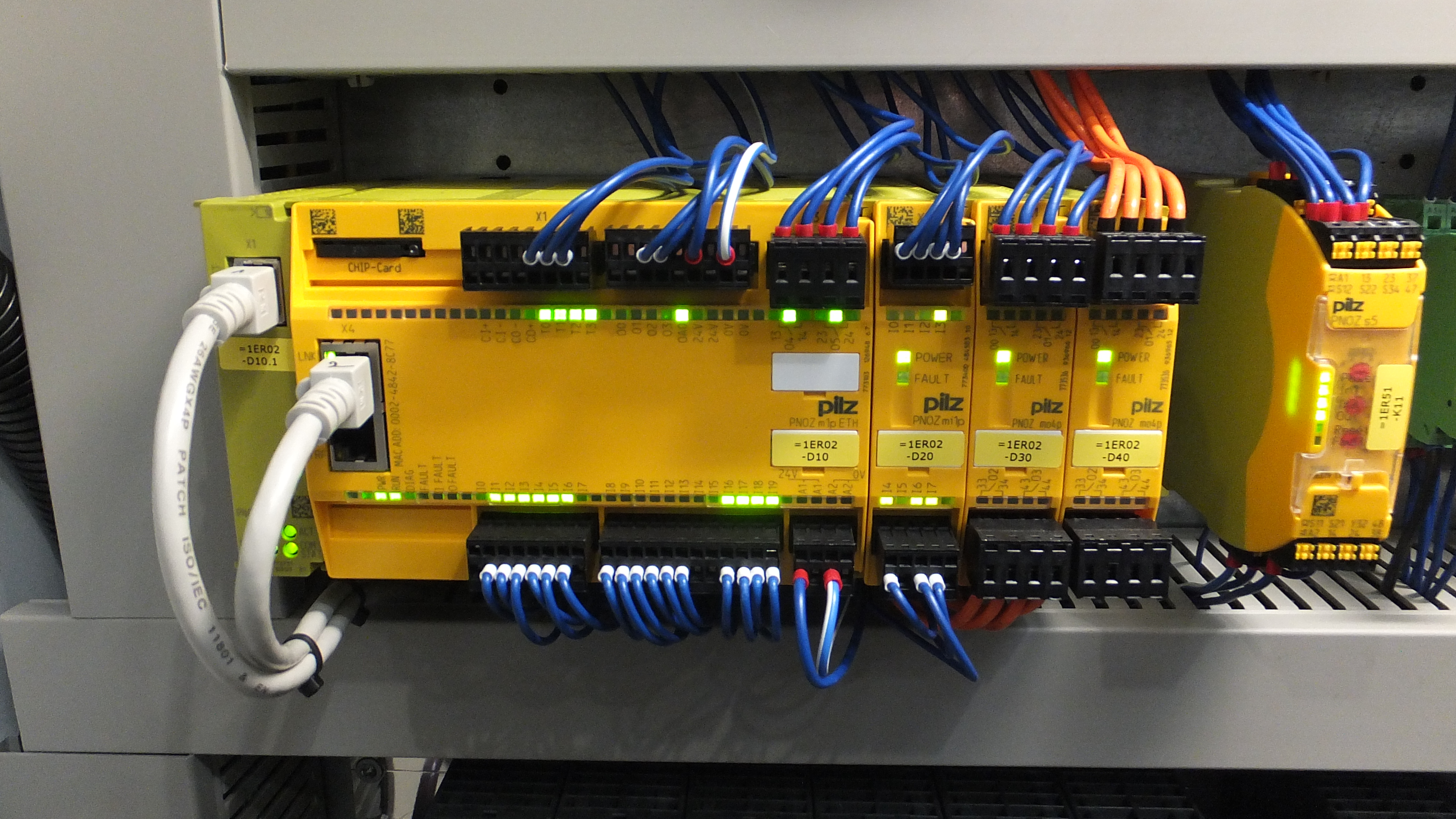 Sicherheitssteuerung in einem Schaltschrank